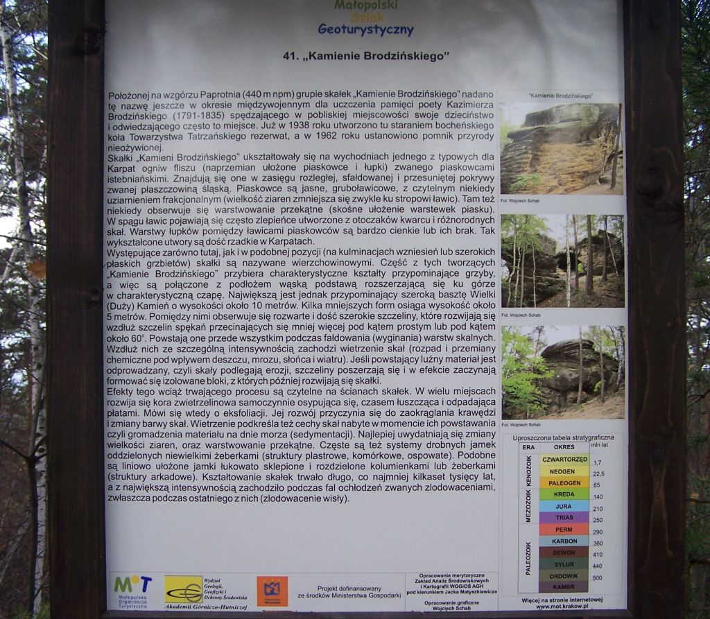 Nature reserve Kamienie Brodzińskiego